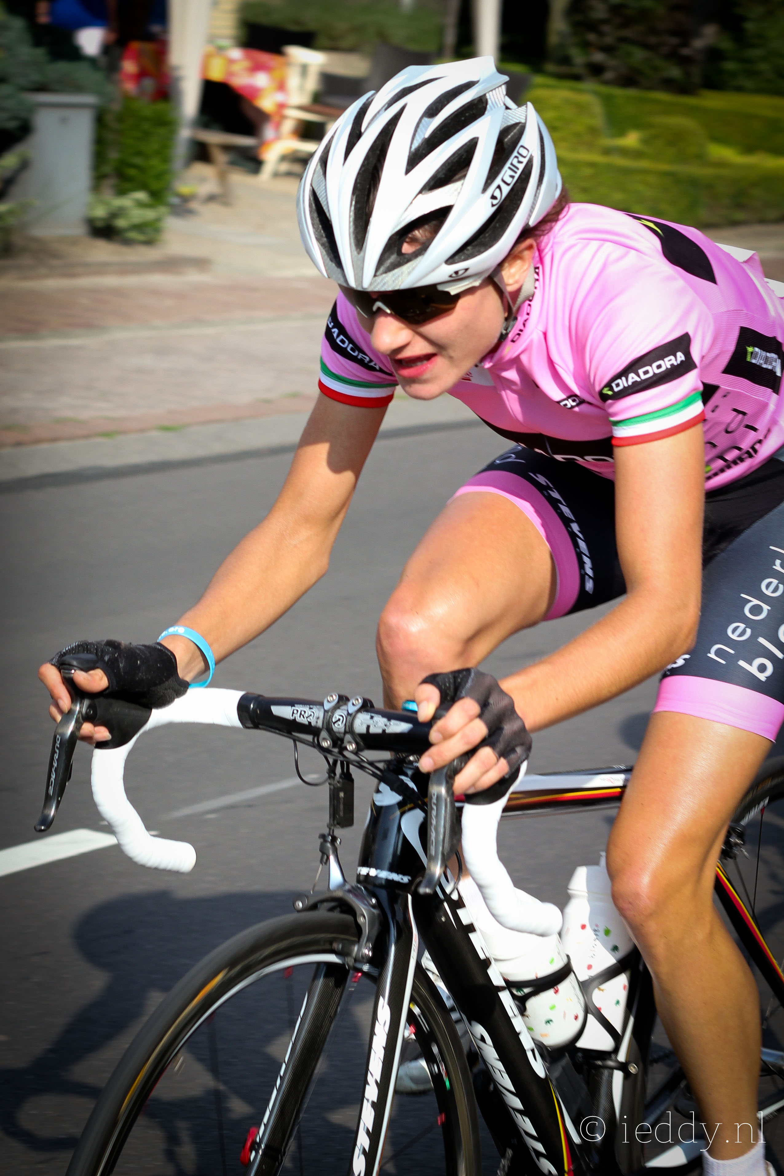 Marianne Vos Draai van de Kaai 2011